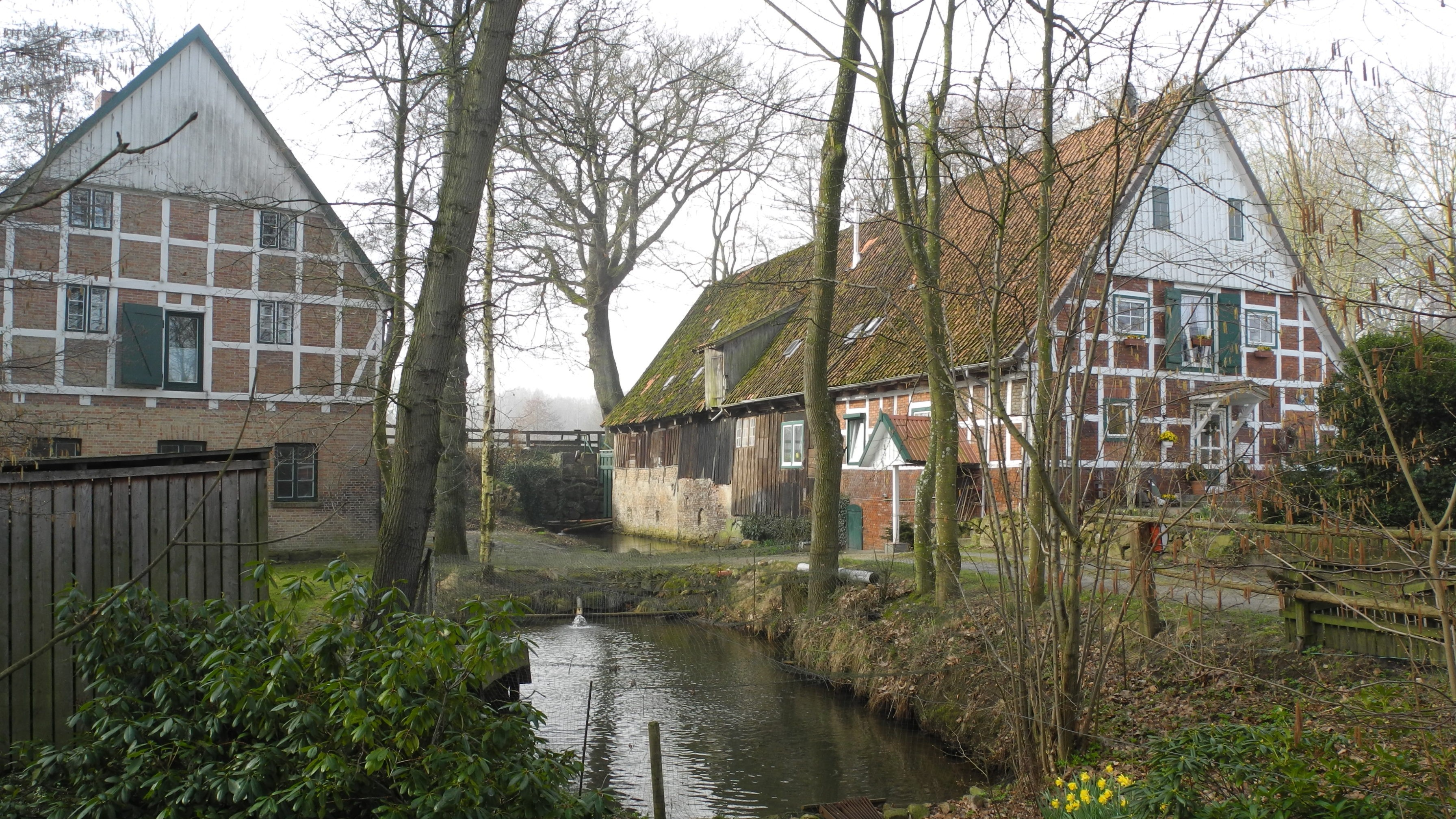 Fredenbeck - Wassermühle und Mühlenbach.JPG